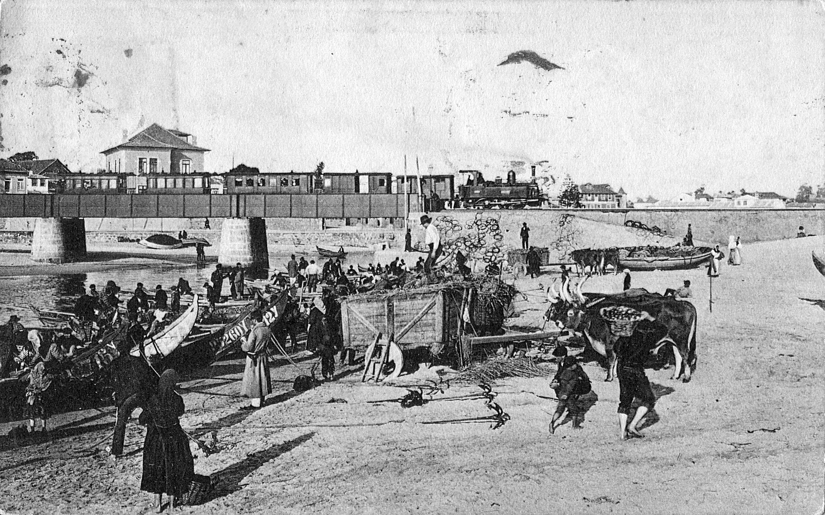 Postal ilustrado mostrando barcos de pesca em Leixões (Matosinhos, Portugal) descarregando sardinha na praia para um carro de bois. Em fundo ponte ferroviária e sobre ela comboio puxado por locomotiva a vapor.